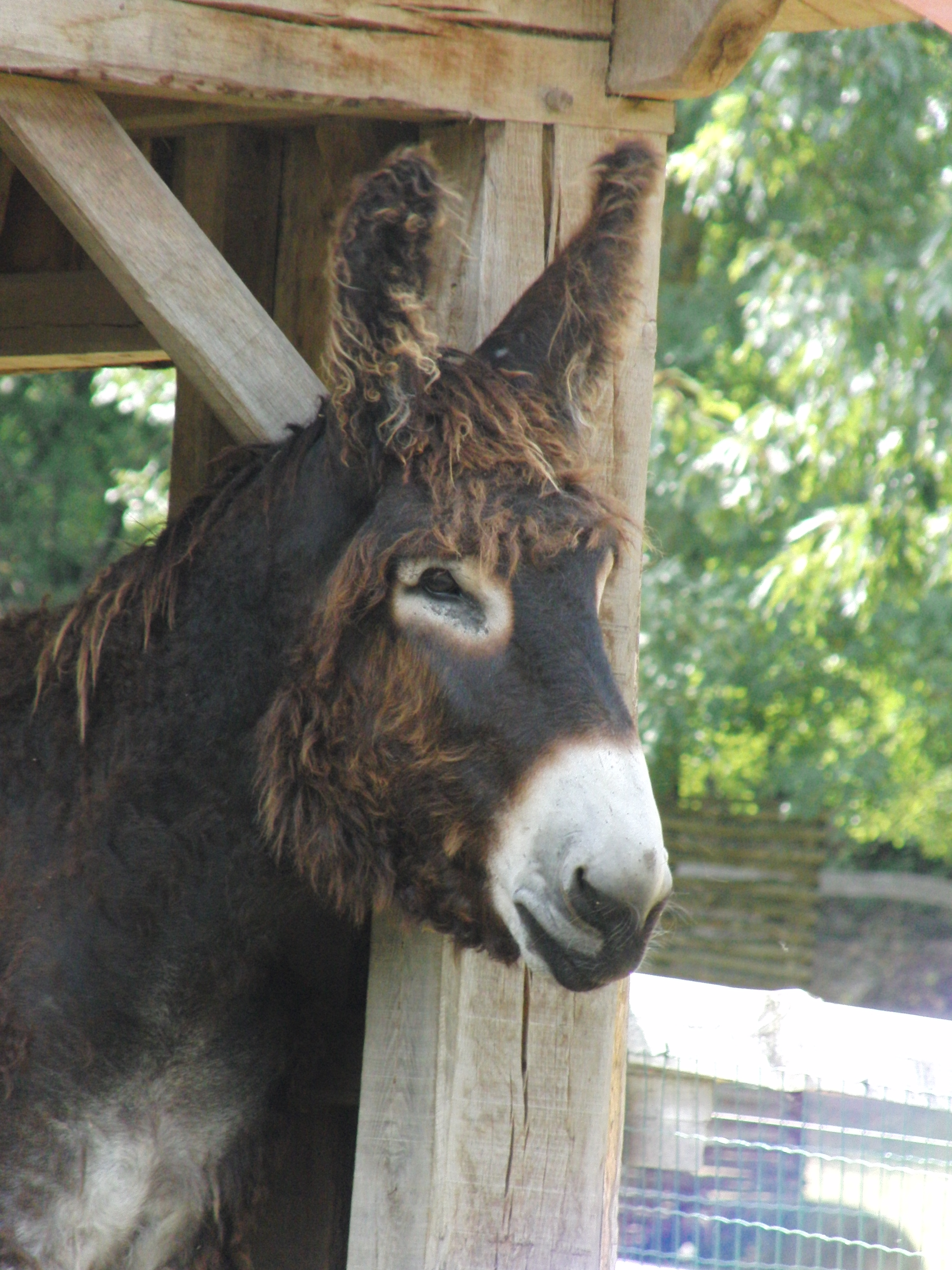 Baudet du Poitou